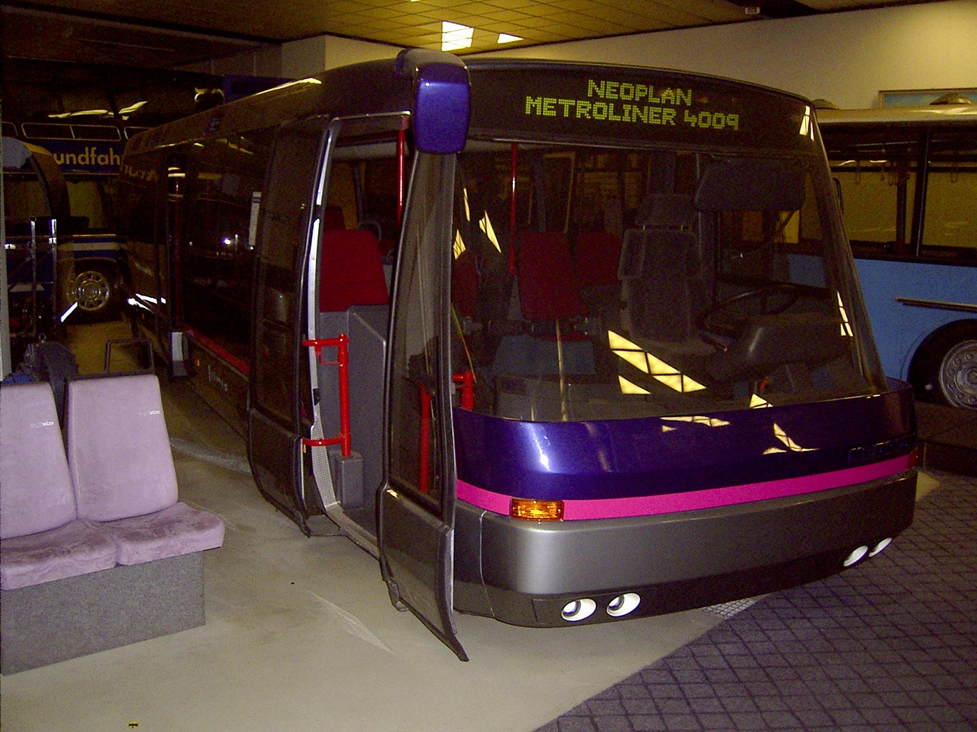 Neoplan Metroliner im Carbondesign im Neoplan-Museum Stuttgart-Möhringen fotografiert von Tilius 5.1.2006